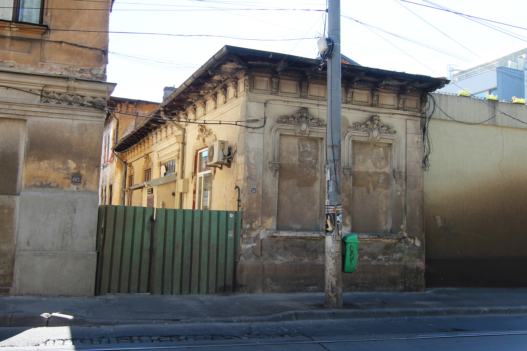 Casă pe Calea Călărașilor